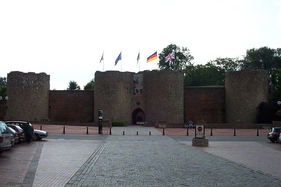 Zelf gemaakt op 10 juni 2005, vrijgegeven onder GFDL